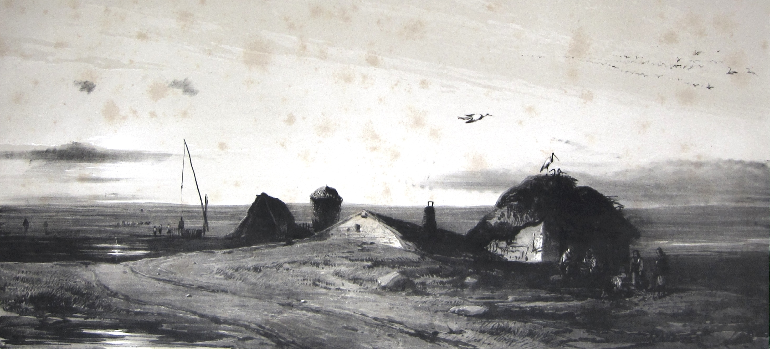 Album valaque : Vues et costumes pitoresques de la Valachie dessinés d'après nature, 1843 Drawing by Michel Bouquet; Engraving by Michel Bouquet and Eugène Cicéri Cabanes dans les steppes (as "Bordei Verde" tavern - resting place on the way Filiu Silistraru Braila, built as a cottage in a heap)